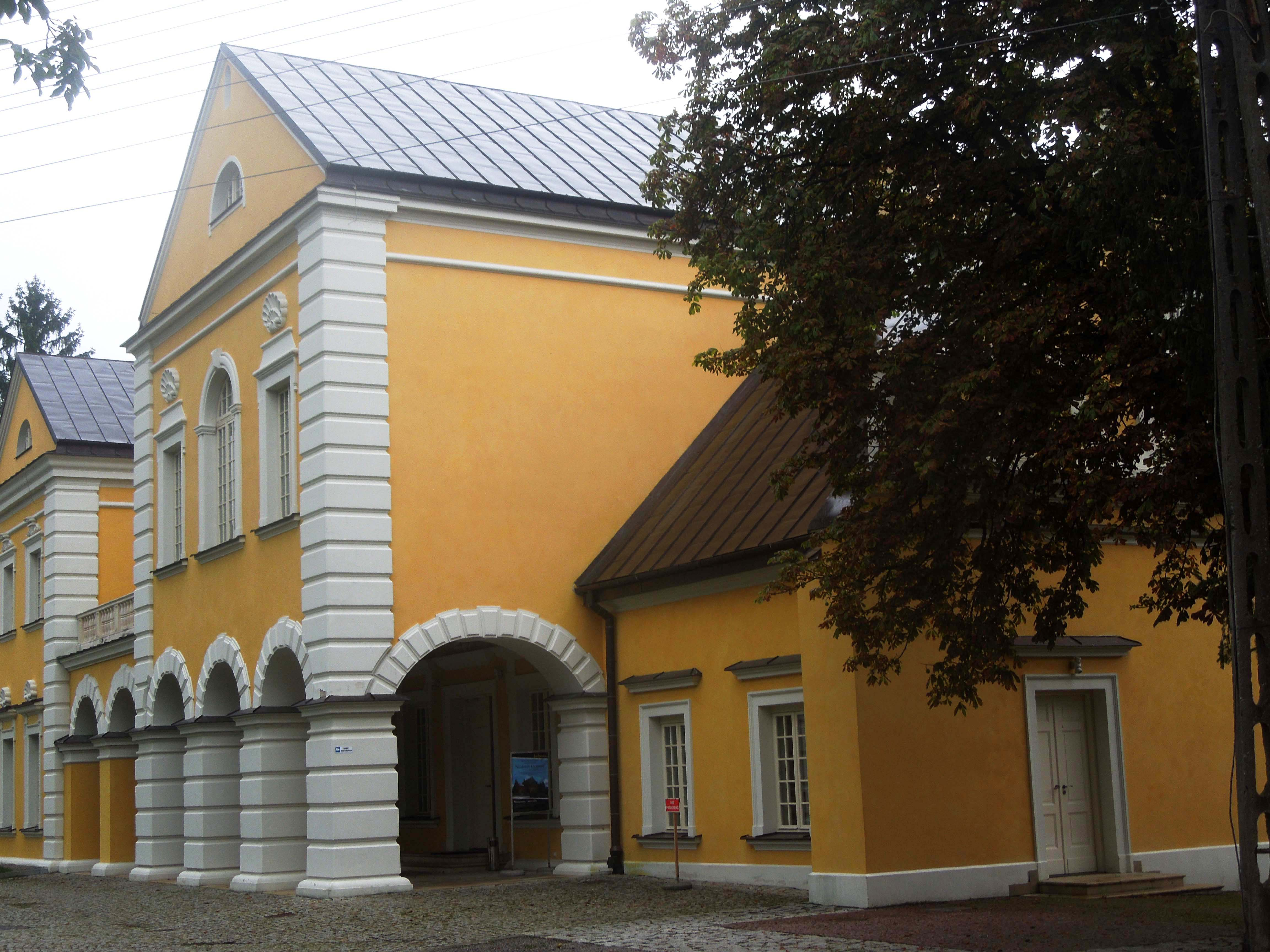 Gardzienice - Pałac